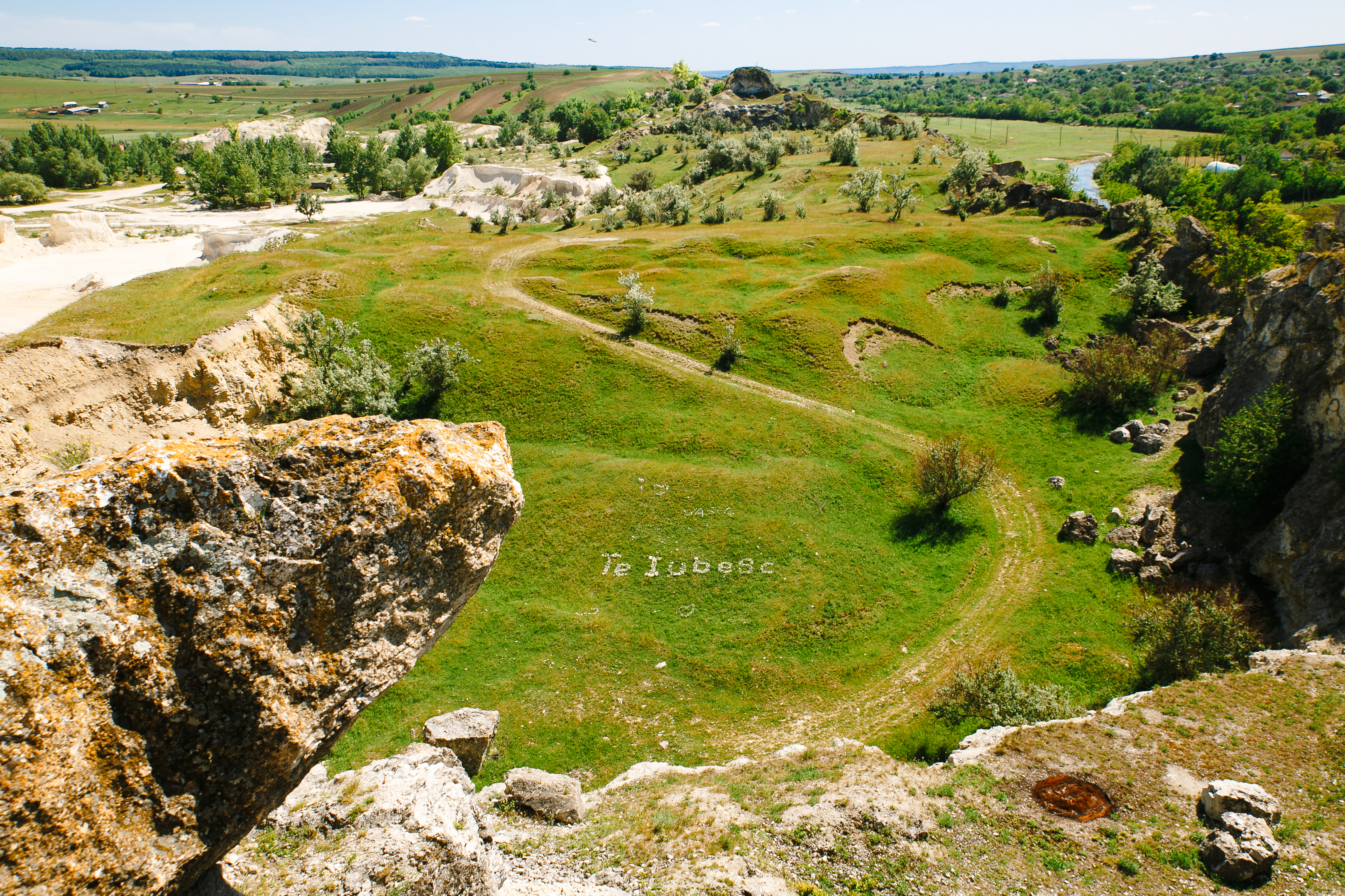 Stînca Mare, monument al naturii amplasat în raionul Glodeni, lângă satul Cobani (cod MD-GL-mn.A-039) A-039